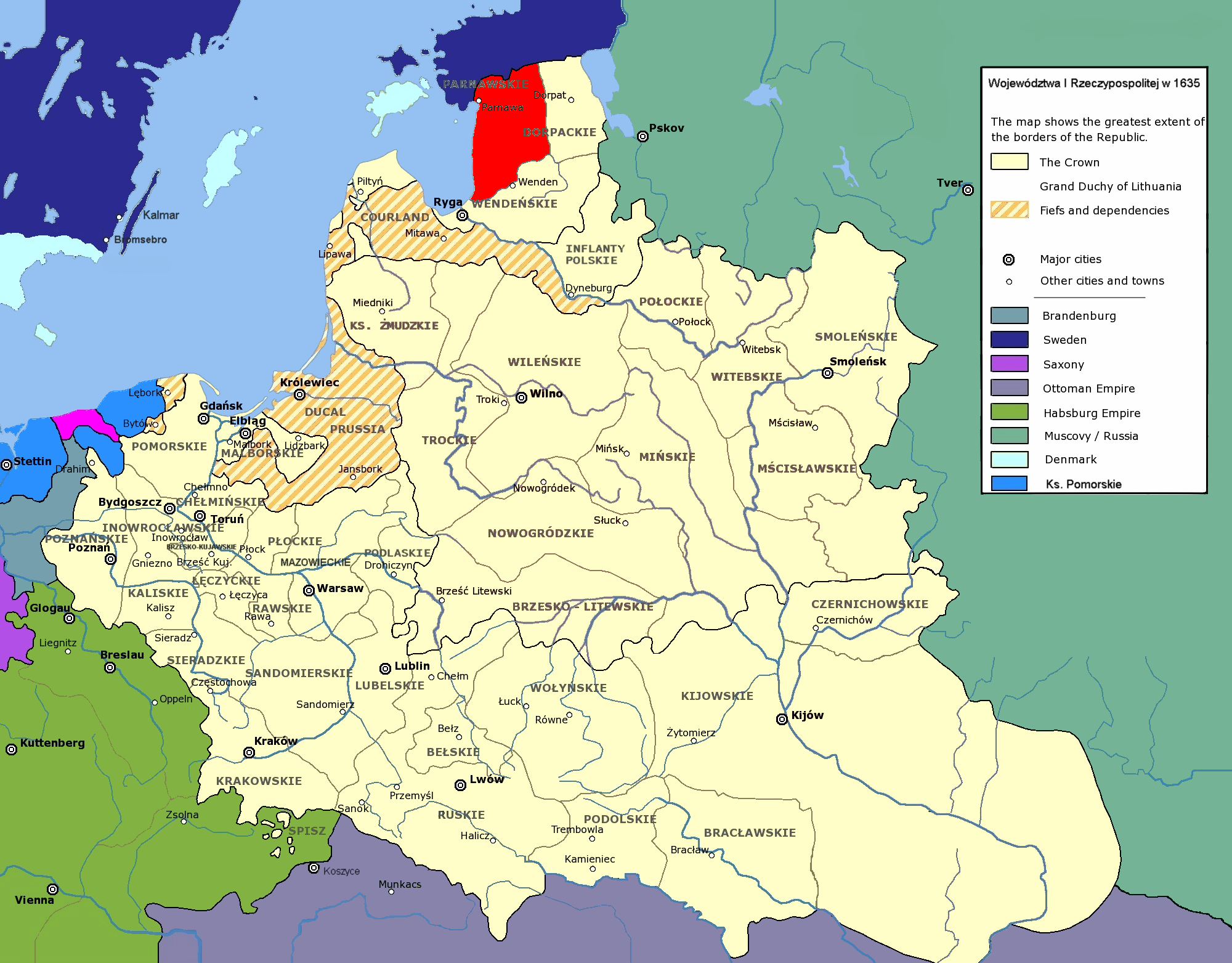 Rzeczpospolita Obojga Narodów w 1635 r.; województwo parnawskie Polish-Lithuanian Commonwealth in 1635; Parnawa Voivodeship